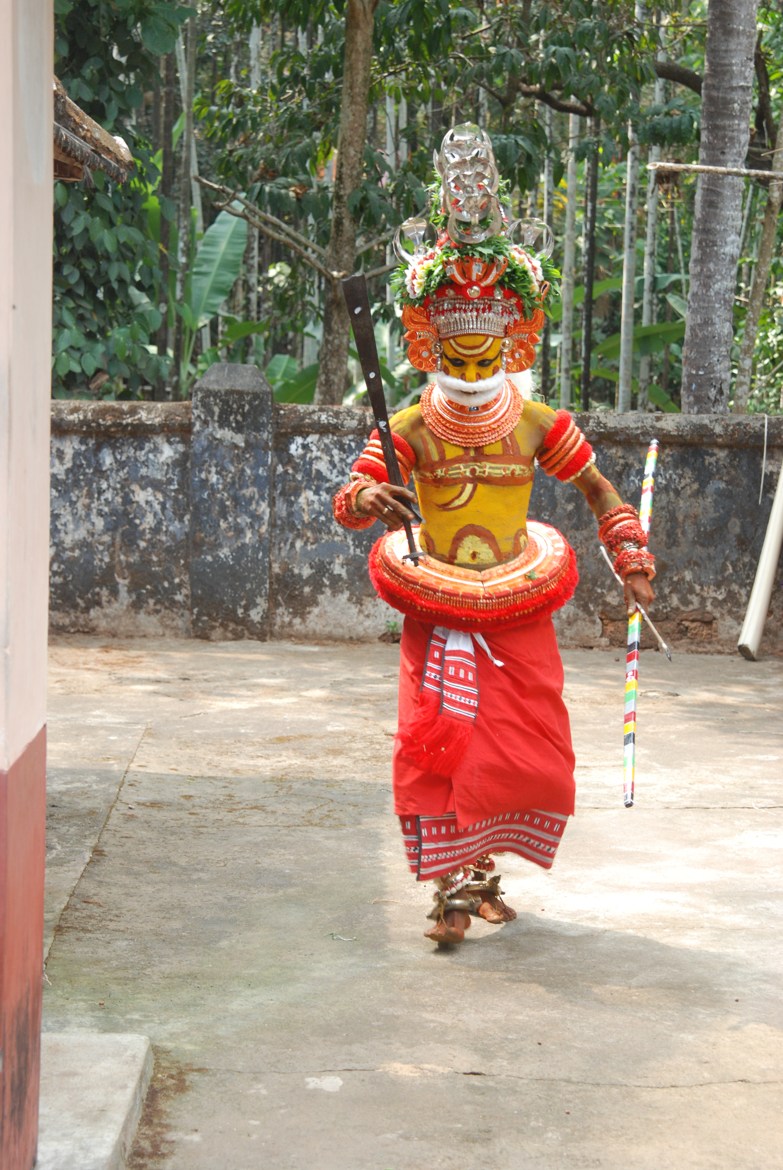 ക്ഷേത്രത്തിനു വലം വെക്കുന്ന മുത്തപ്പന്‍ തെയ്യം (വെള്ളാട്ടം)